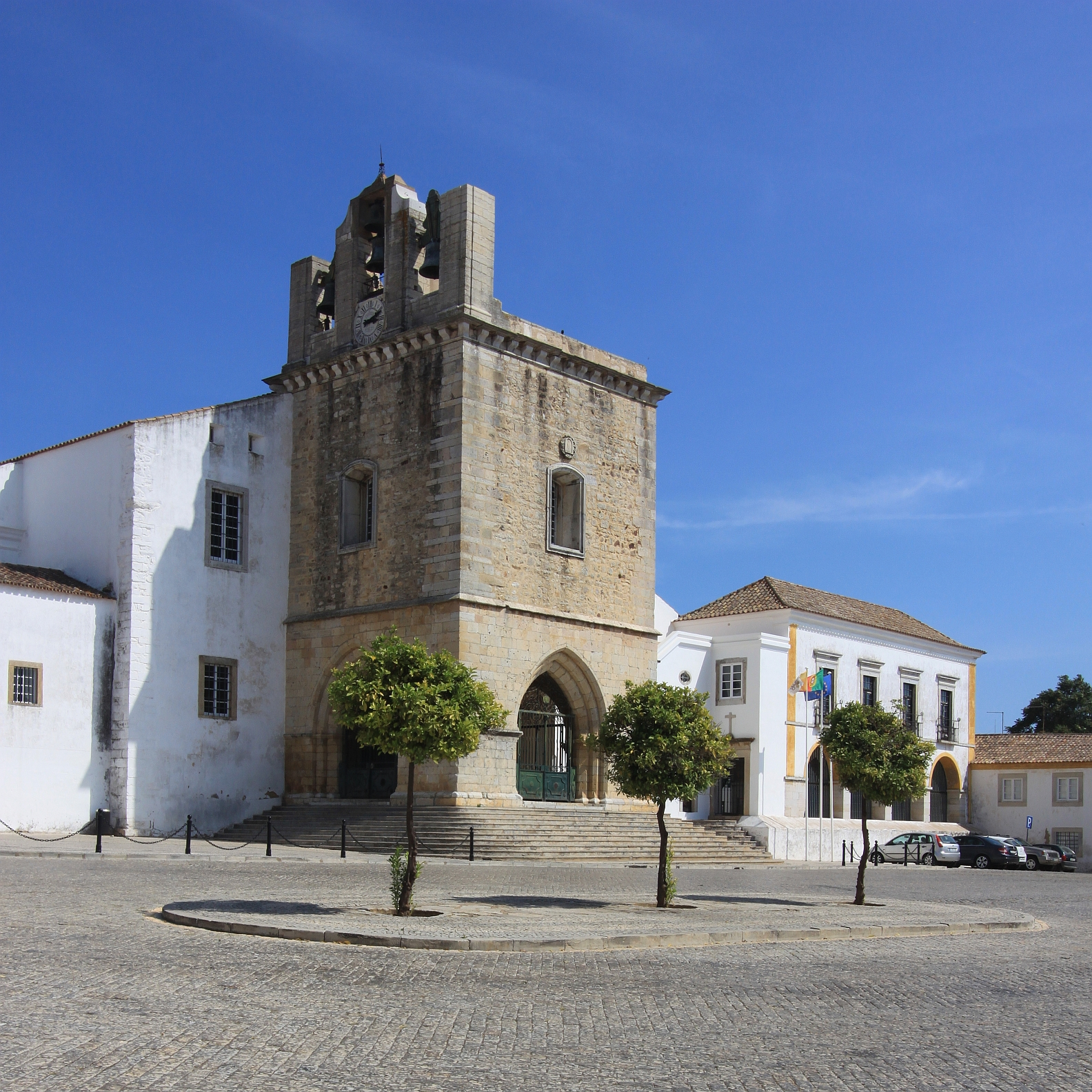 Kathedrale, Faro, Algarve, Portugal